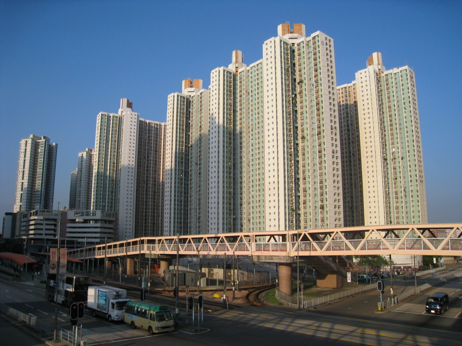 HK Tin Yat Estate 天逸邨